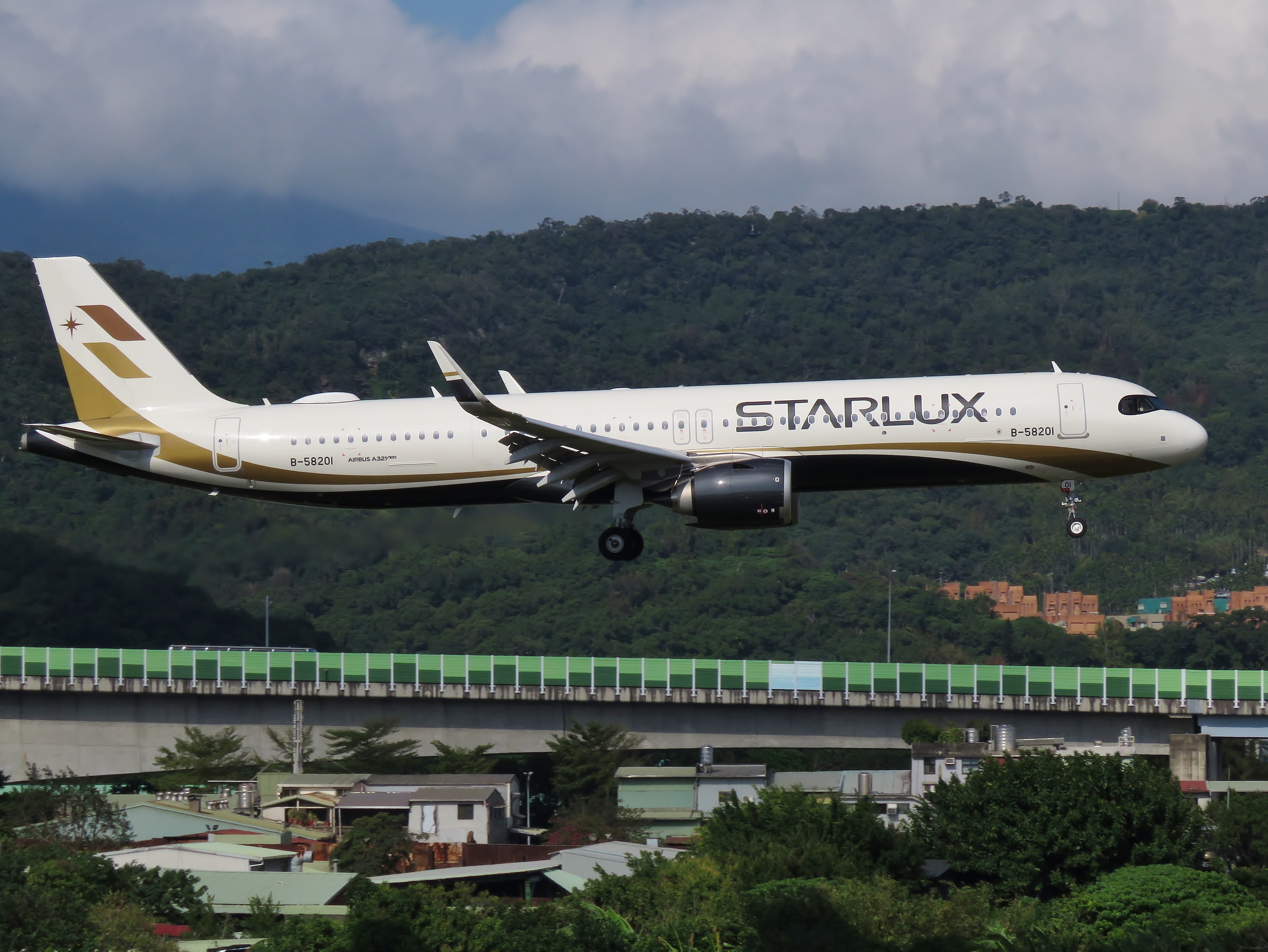 星宇航空首架A321neo(編號:B-58201)在臺北松山機場進場